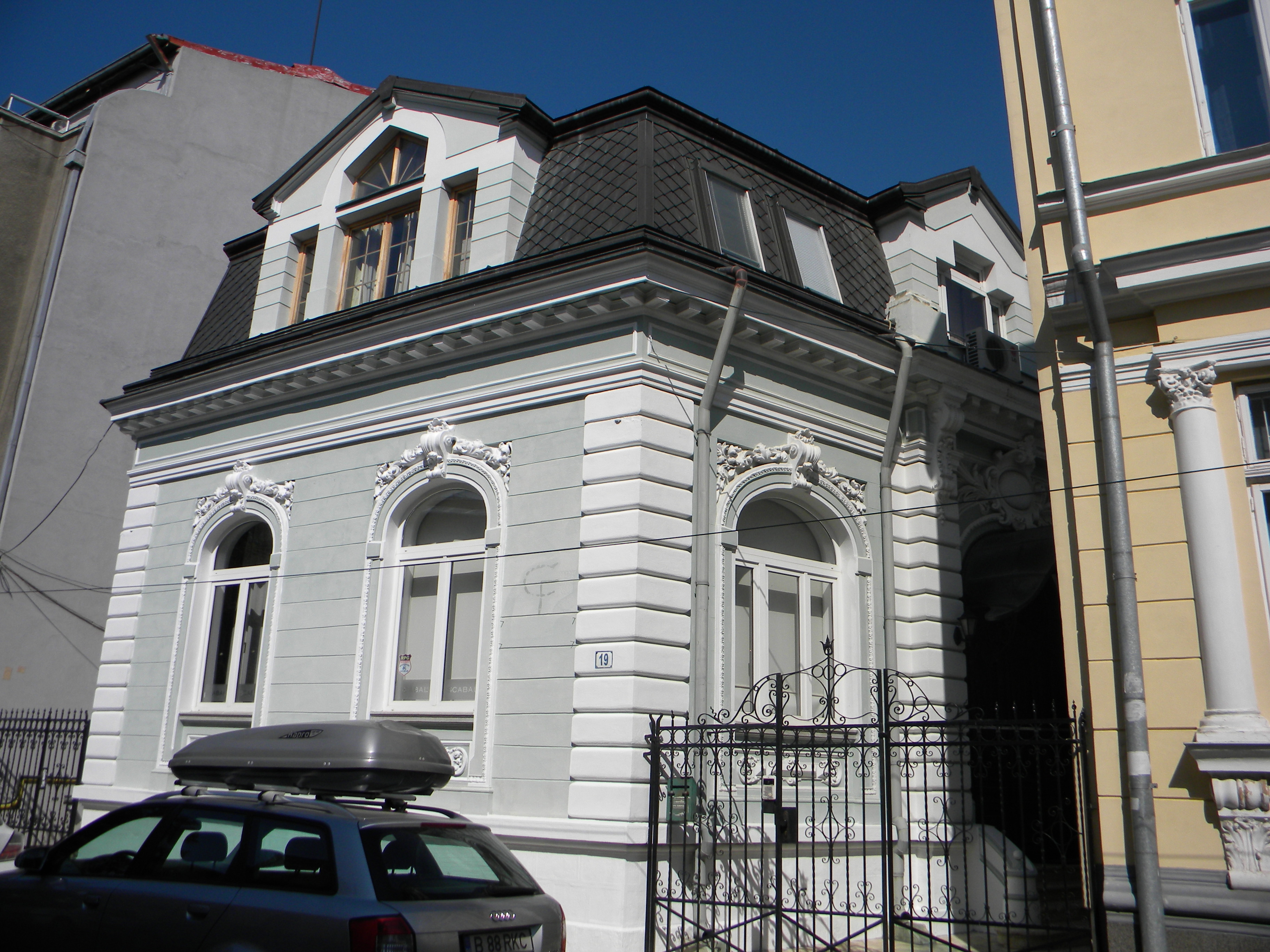 Bucuresti, Romania, Casa pe Str. Frumoasa nr. 19, sect. 1